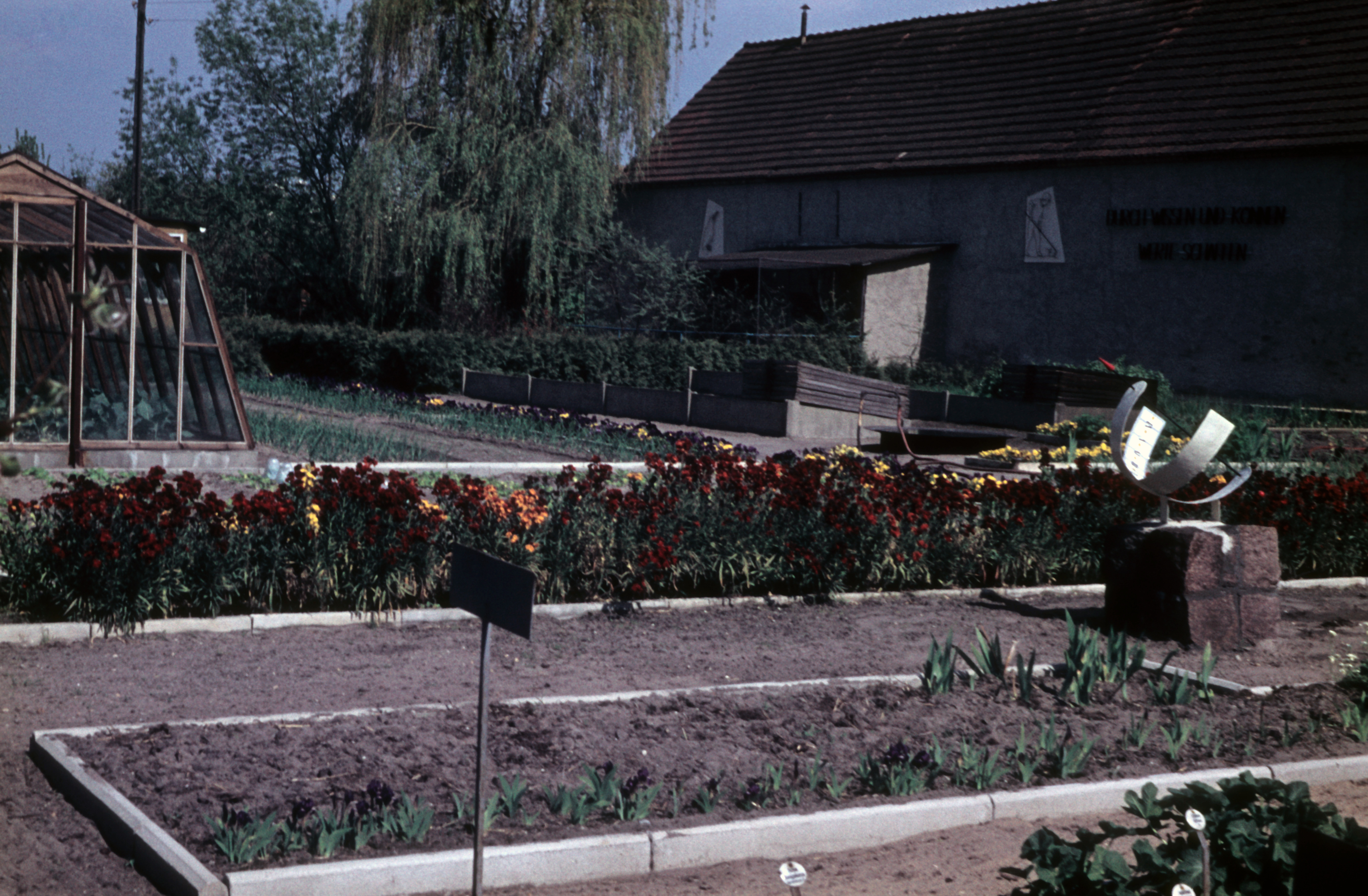 Ruhland, Hartwigstraße, Schulgarten vor dem Gewächshaus, Schrift "Durch Wissen und Können Werte schaffen" und Figur eines Grabenden an der benachnbarten Scheunenwand